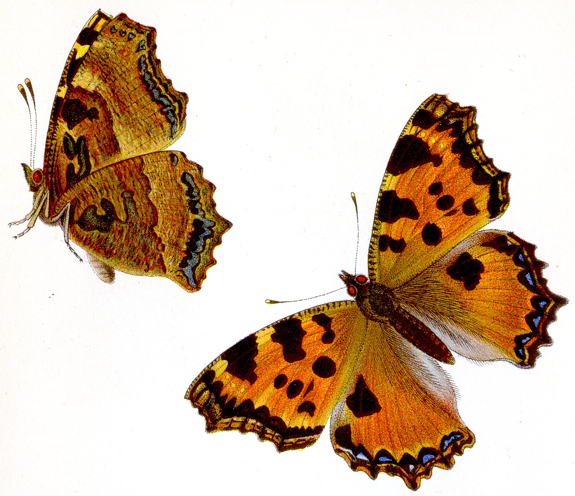 Großer Fuchs - Nymphalis polychloros